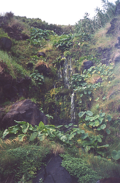 Fajã de Vasco Martins, cascata de nascente apresentado elevada biodiversidade, Toledo, Velas, ilha de São Jorge, Açores, Portugal.